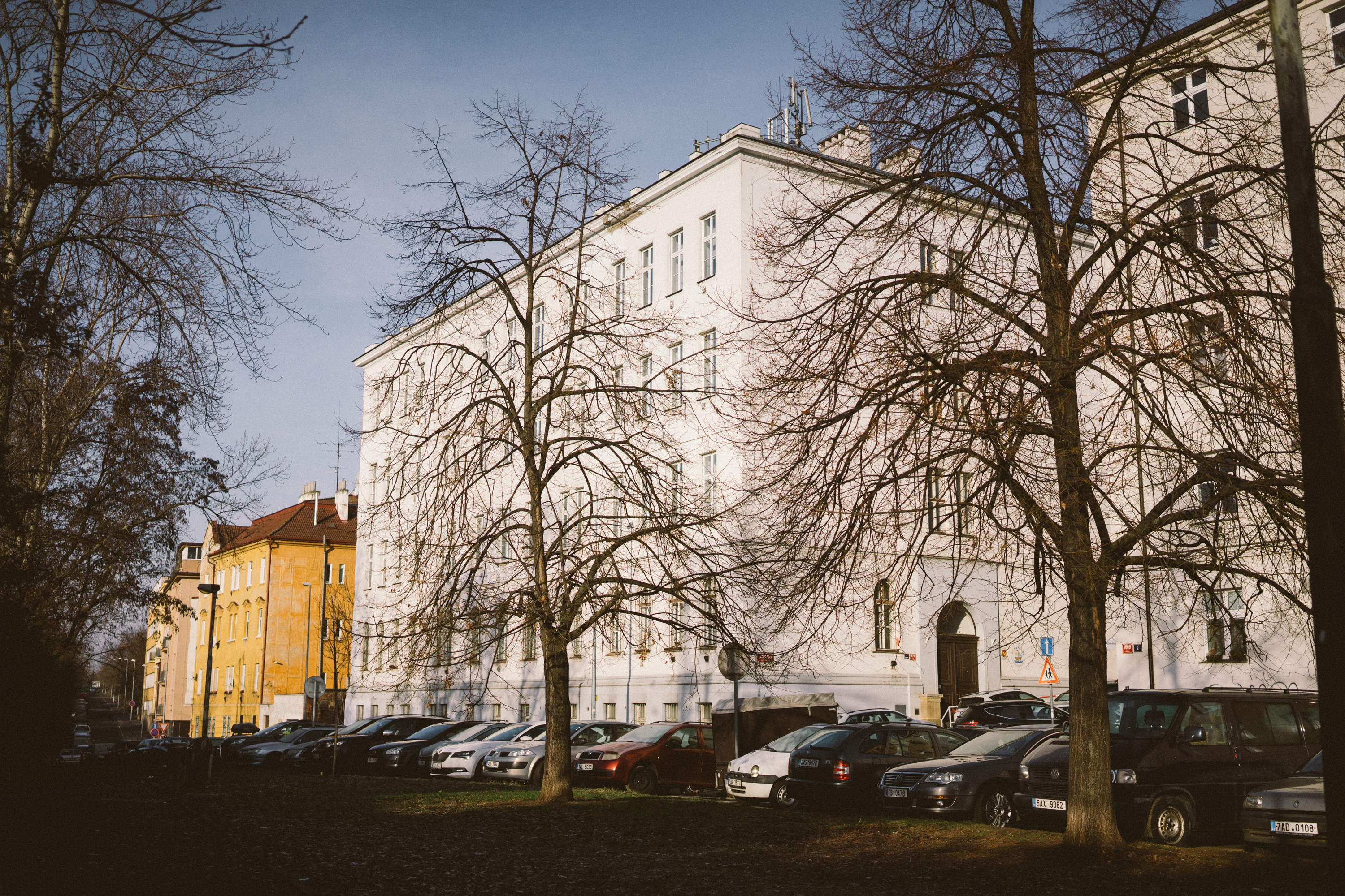 Soukromá vysoká škola